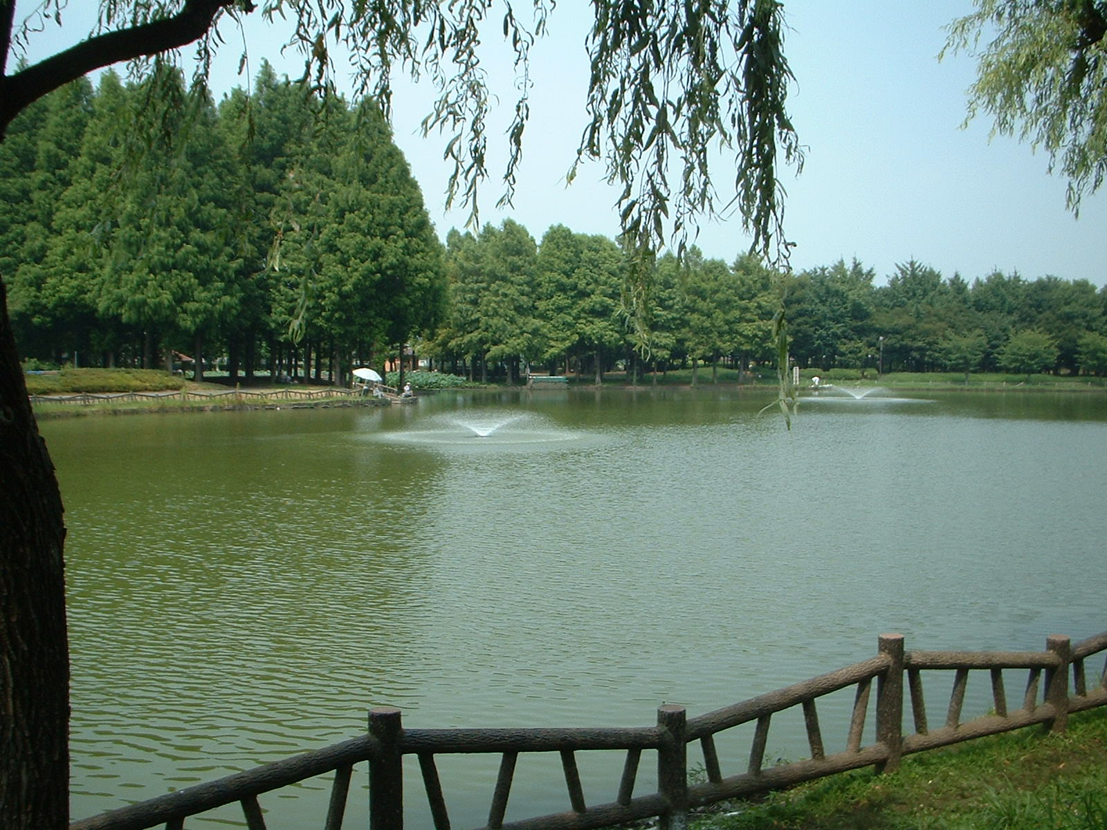 北本総合公園にある池